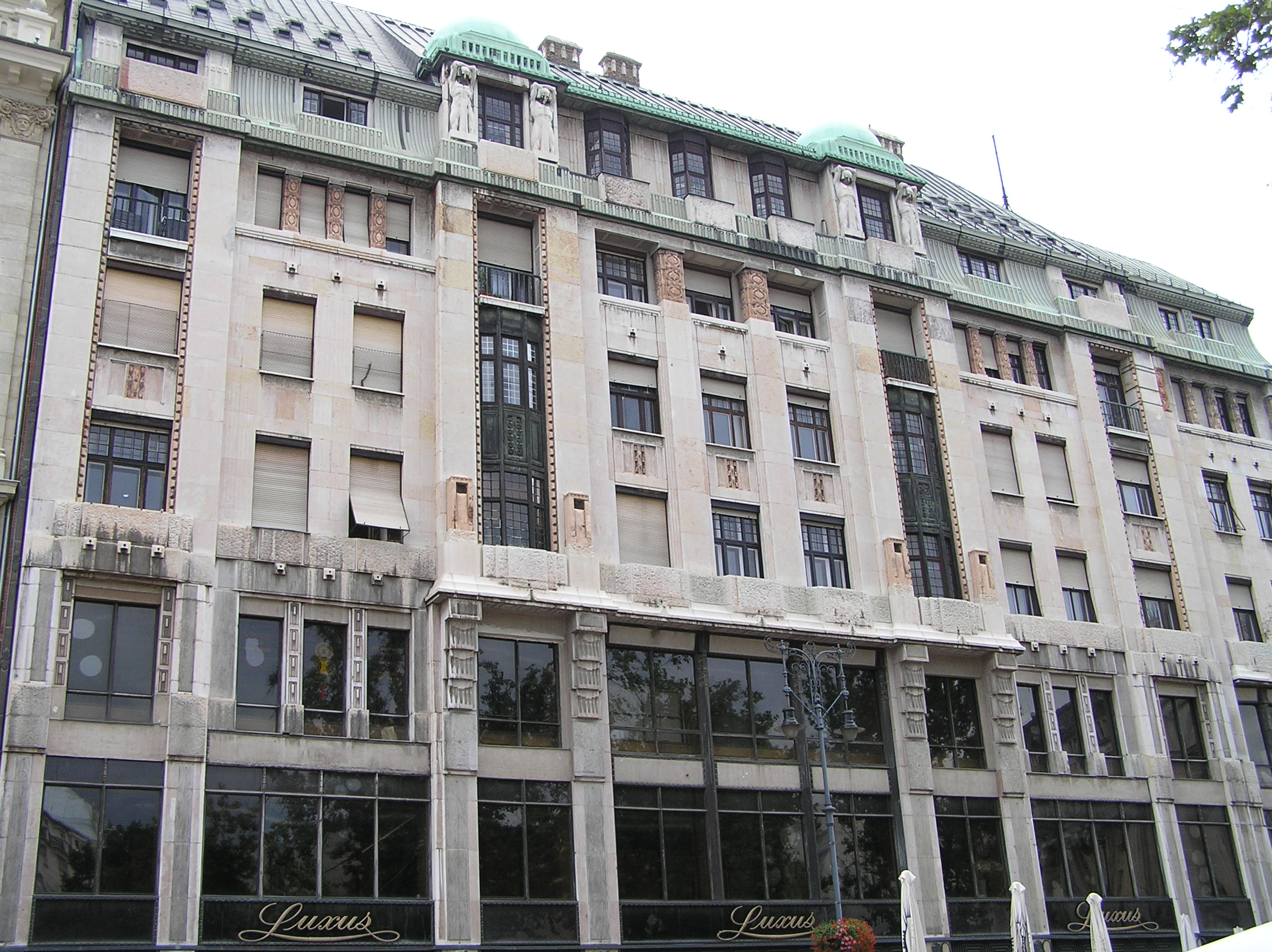 Luxus Department Store (Luxus Áruház), Vörösmarty Square, Budapest V, Hungary (Kálmán Giergl & Flóris Korb, 1911)